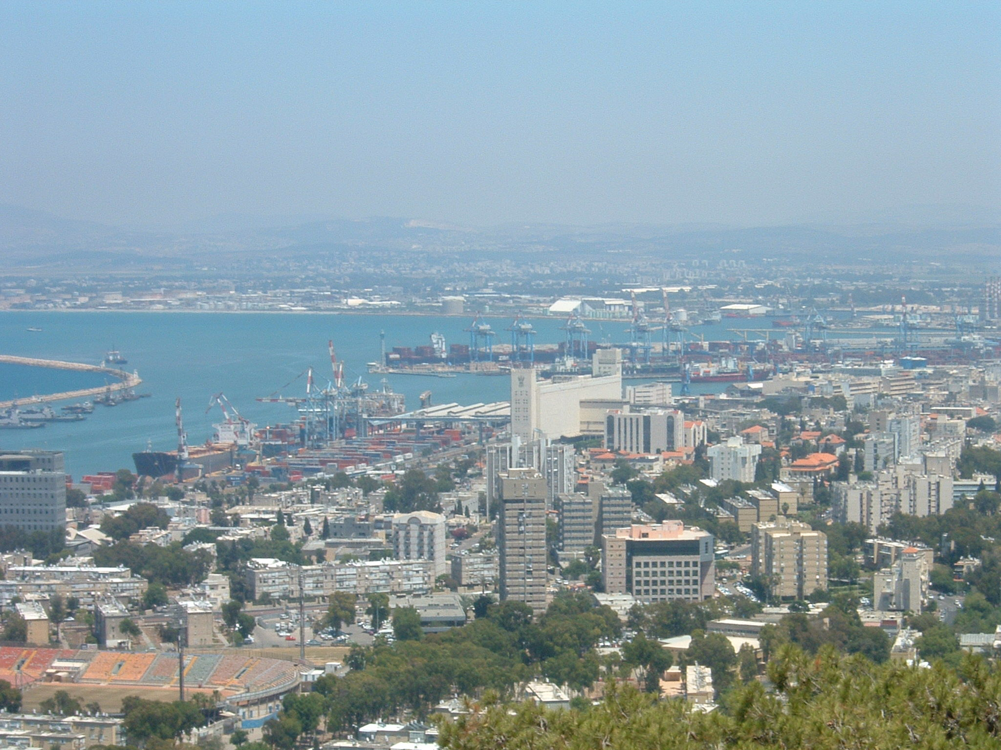 Foto scattata da me il 12 giugno 2008 Vista di Haifa